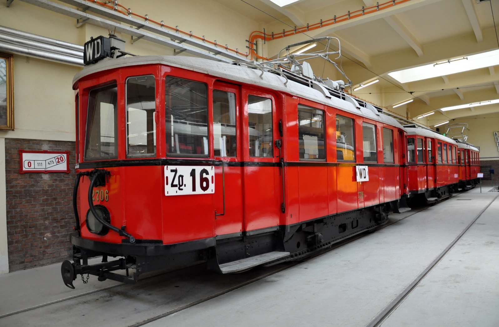 Tram Museum (40)